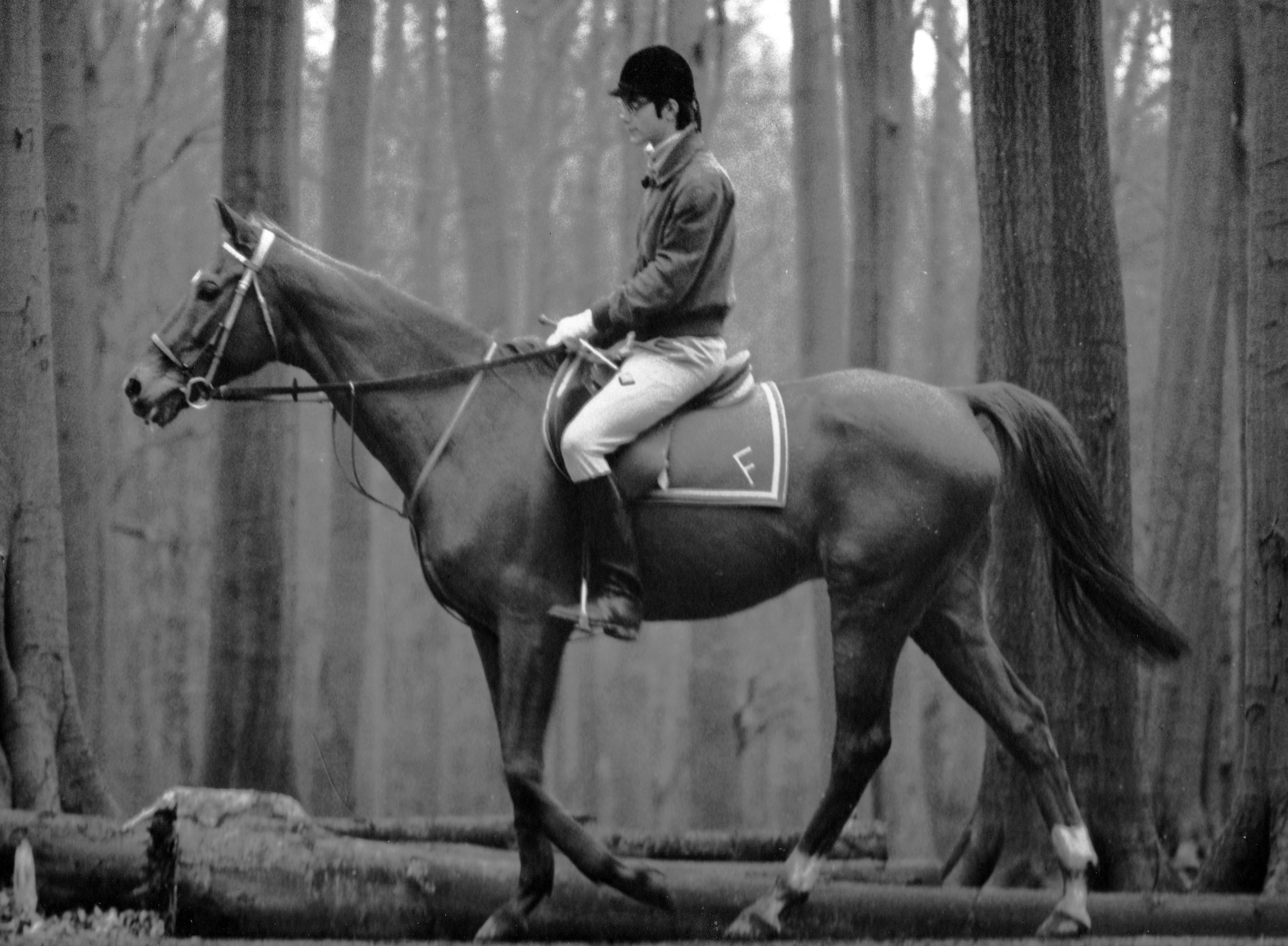 Kimono (pur-sang belge) et son propriétaire, au sentier des Merles, dans la forêt de Soignes (Belgique). Sur cette photo le cheval porte une martingale à anneaux, et, la selle du cavalier, des étriers compensés. Le tapis de selle est monogrammé "F" de La Foresterie à Watermael-Boitsfort en Belgique.